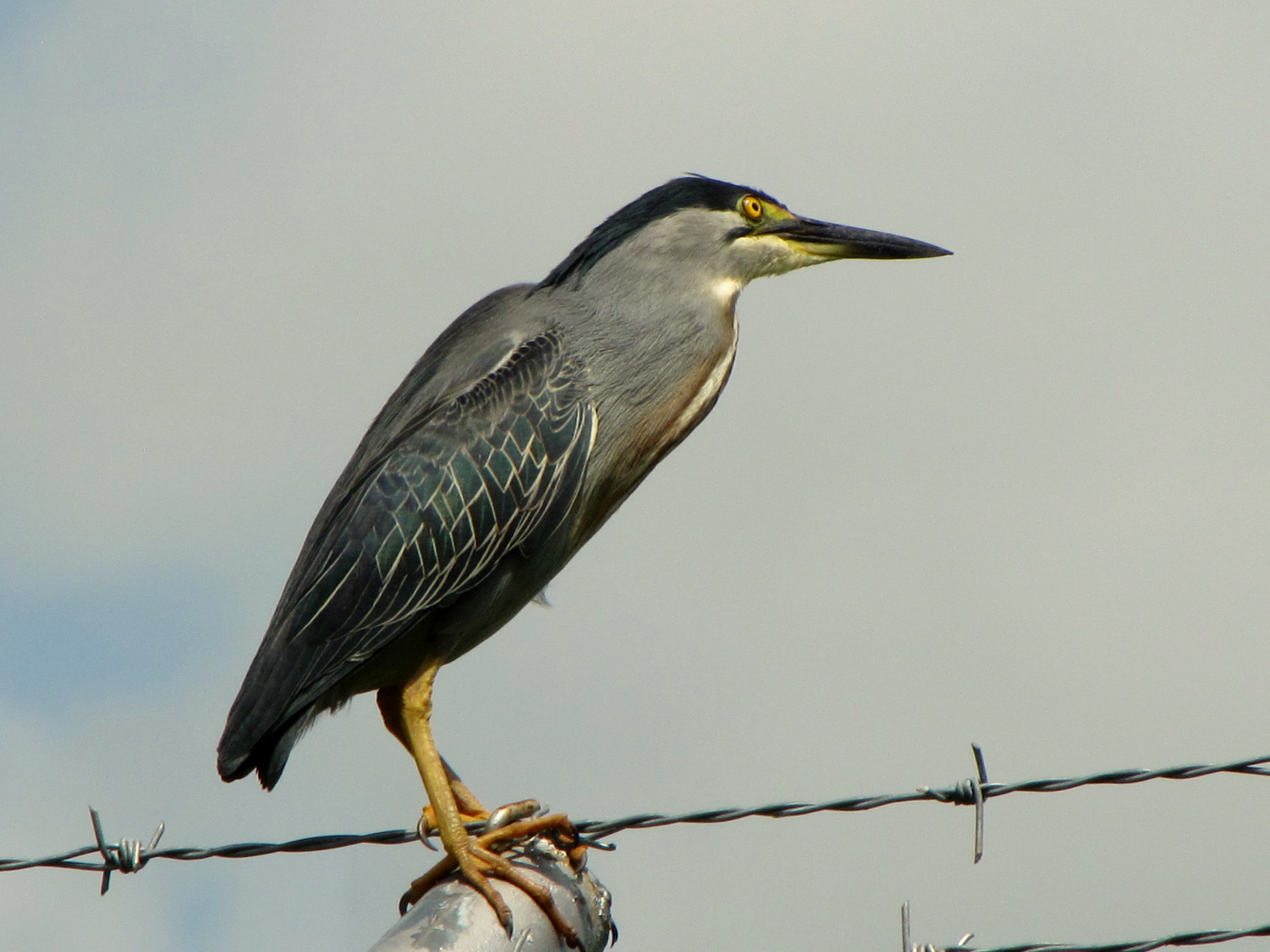 Butorides striata (Garcita rayada)